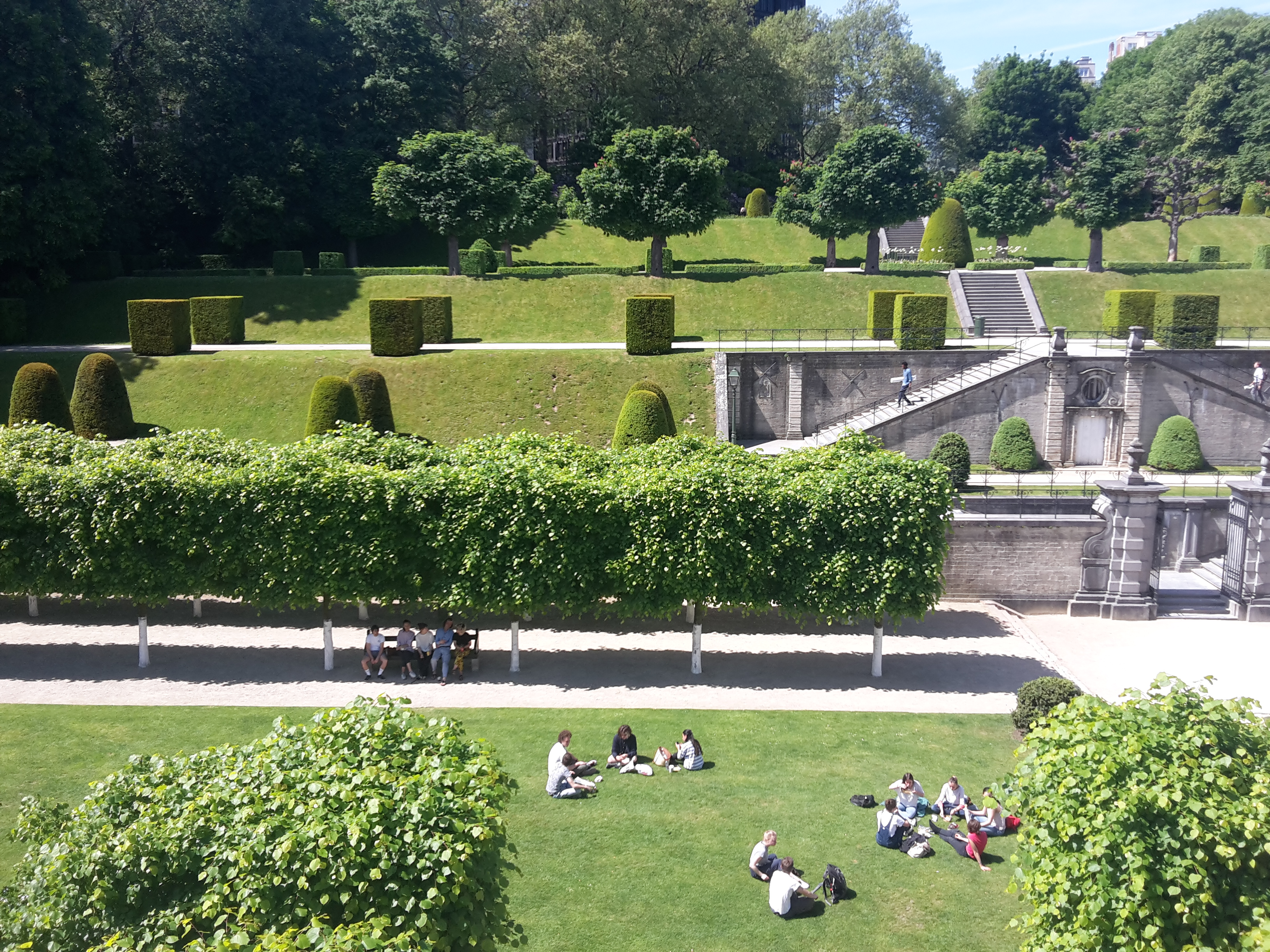 Étudiants dans le jardin, photo prise depuis l'atelier de sérigraphie au 2e étage